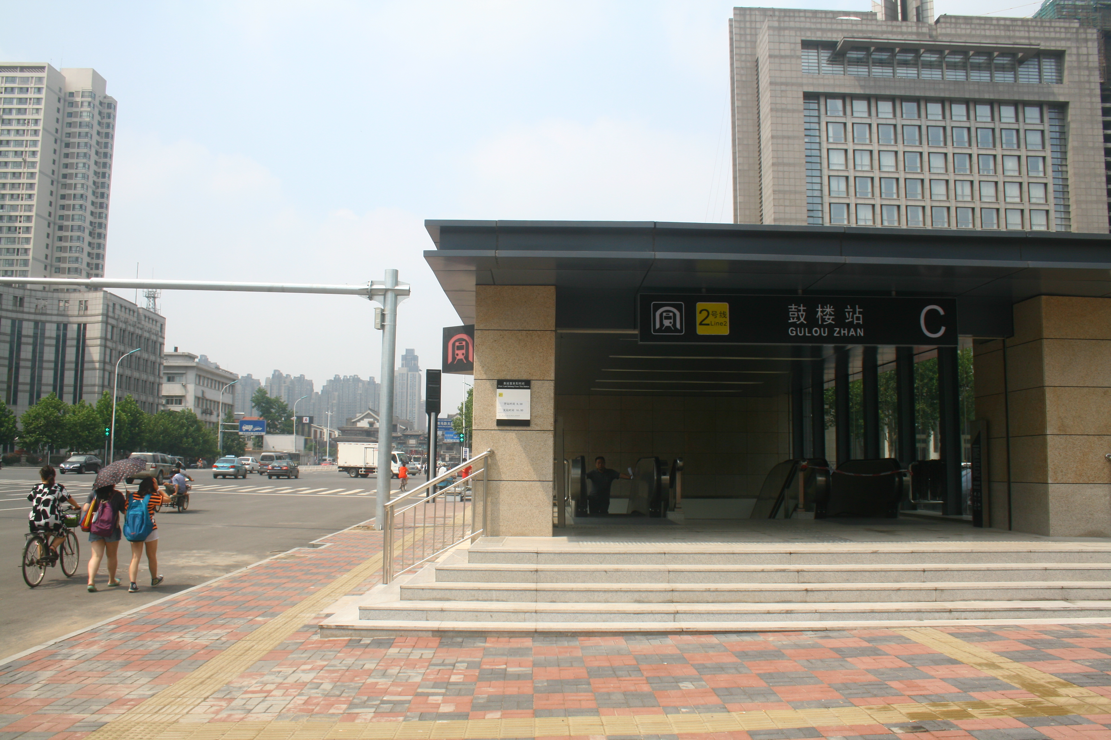 鼓樓站 (天津)C出口。圖片左後方即為鼓樓文化街。